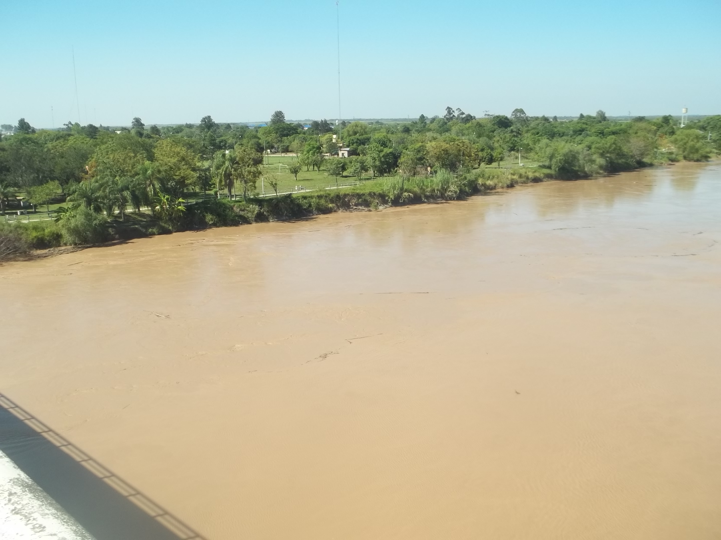 Vista de la costa del río Bermejo en Lucio V. Mansilla.